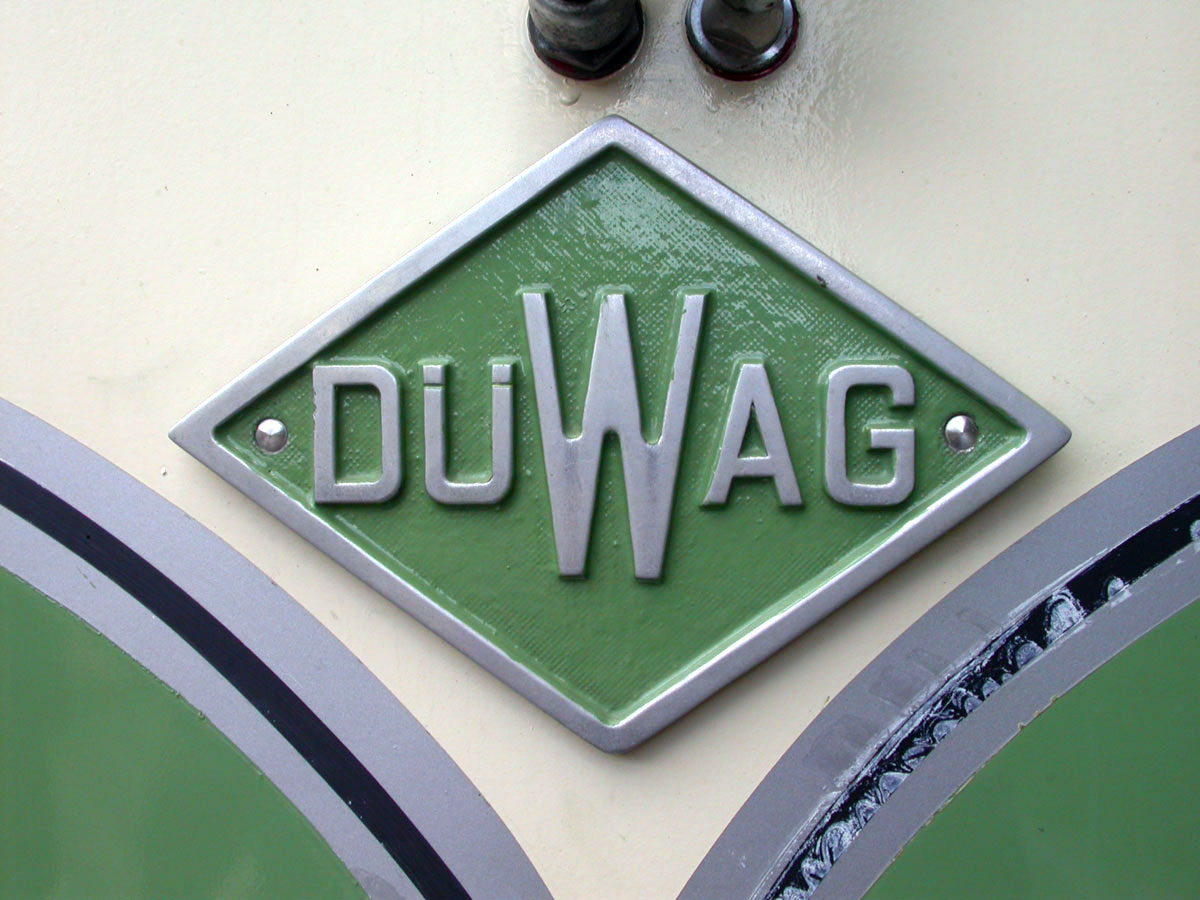 Logo der DÜWAG